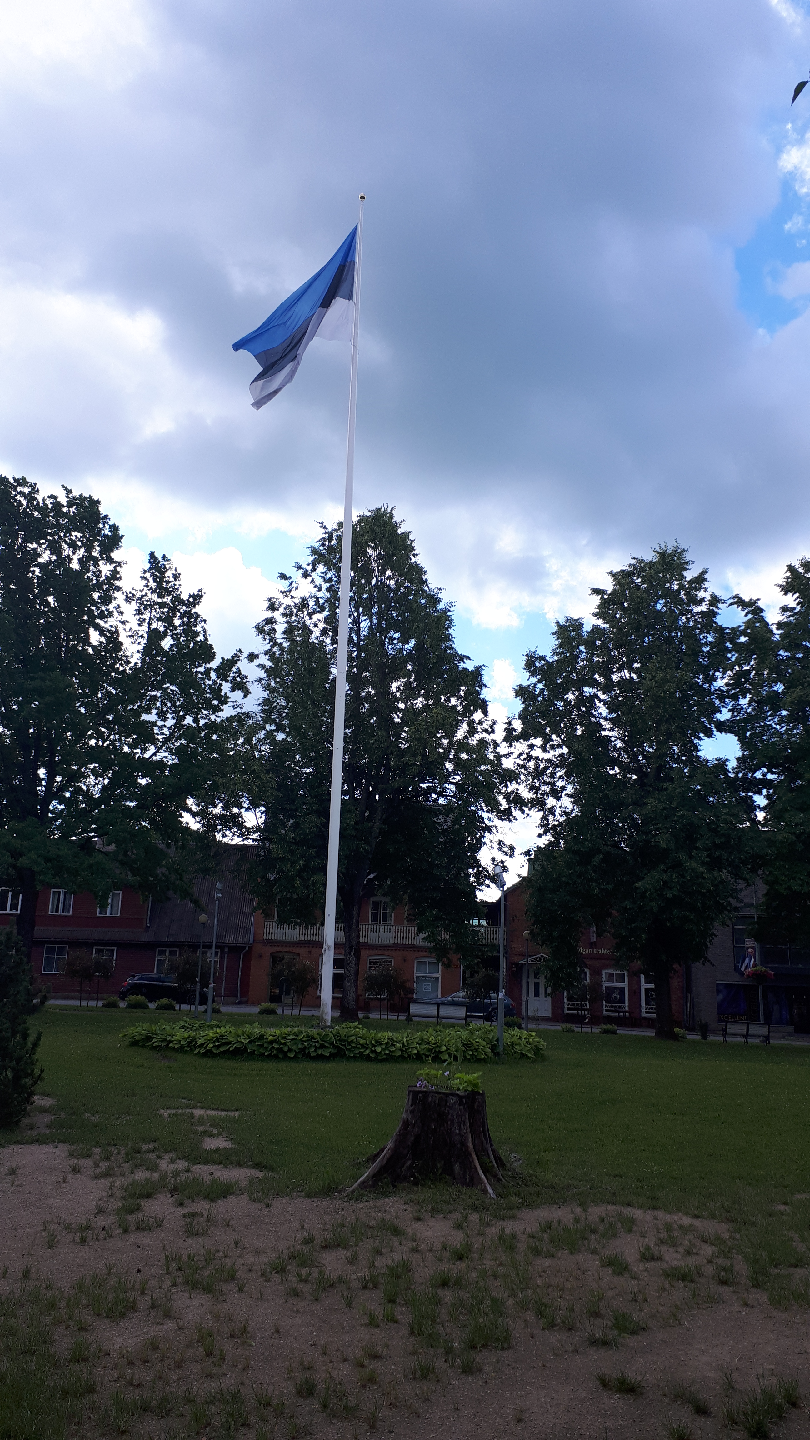 Flaga estońska w miejscowości Otepää, Estonia.